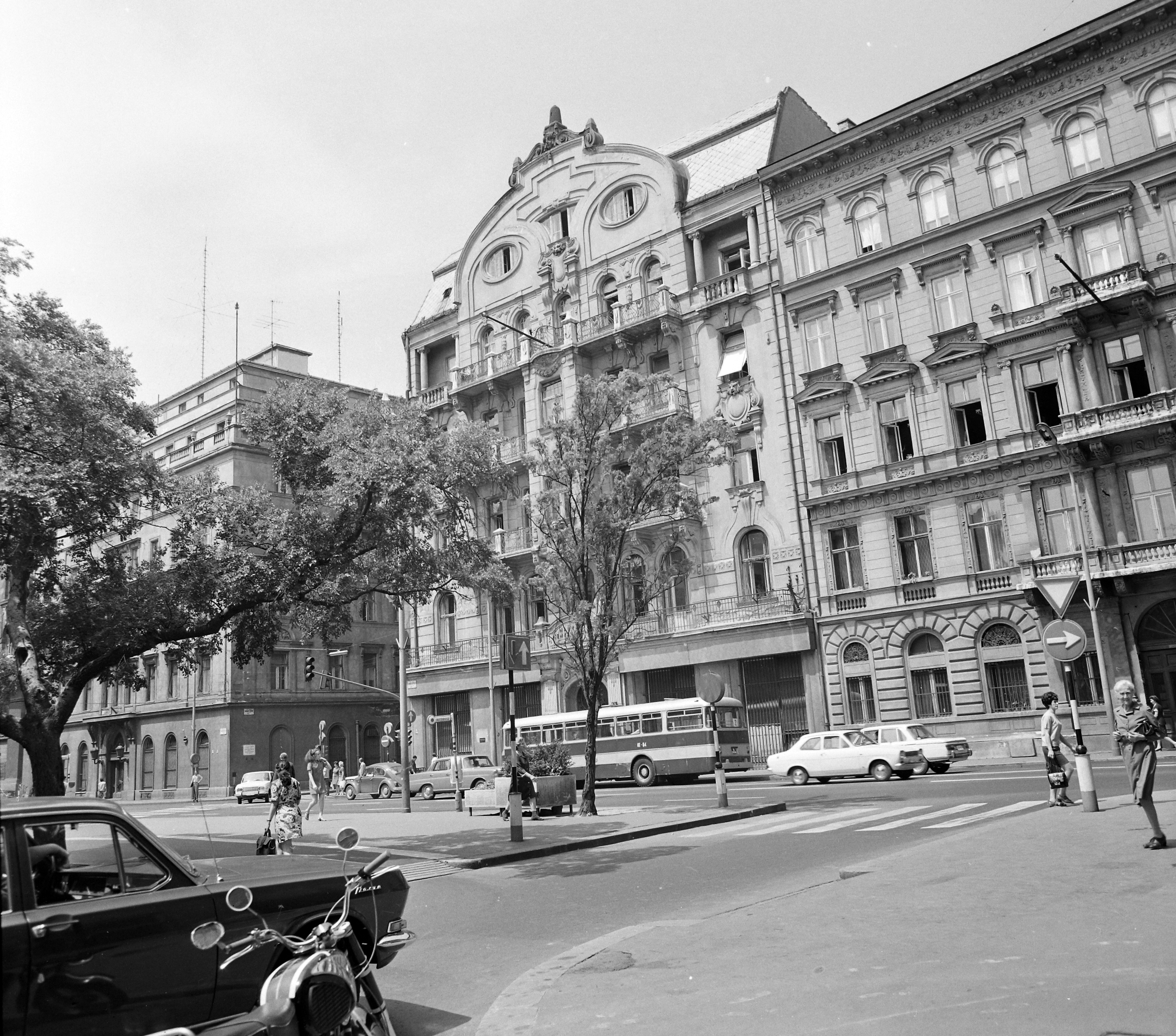 József nádor tér a József Attila utca 8 felé nézve, balra a Nádor (Münnich Ferenc) utca. Location: Hungary, Budapest V. Tags: Budapest Title: József nádor tér a József Attila utca felé nézve, balra a Nádor (Münnich Ferenc) utca.